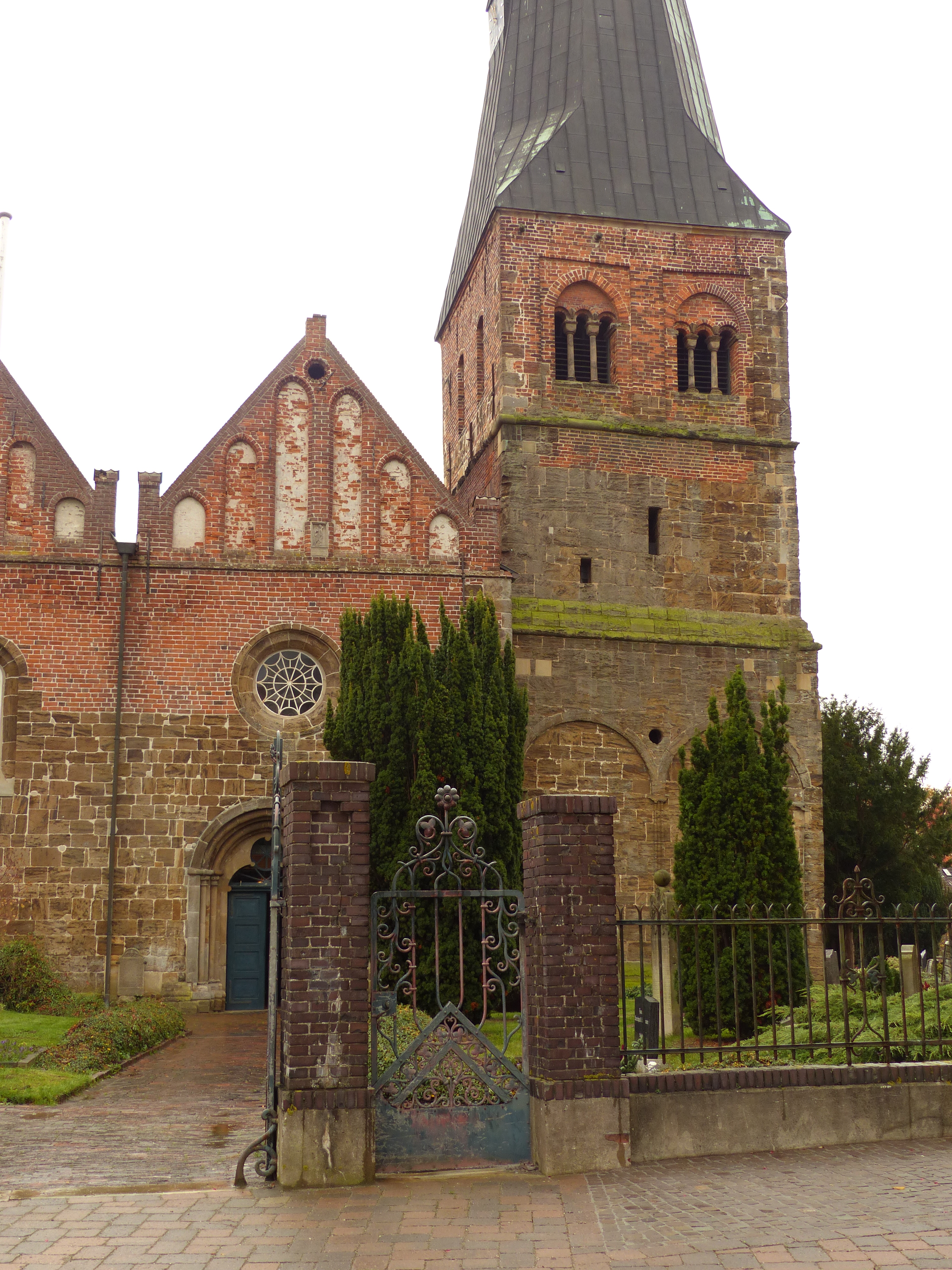 Aegidiuskirche Berne: Turm von Norden